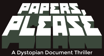 Logo sin acceso a copyright usado para identificar el juego "Papers, please" en la wikipedia en español.